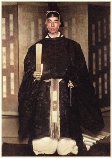 鹿島萩麿。もと(山階宮)萩麿王